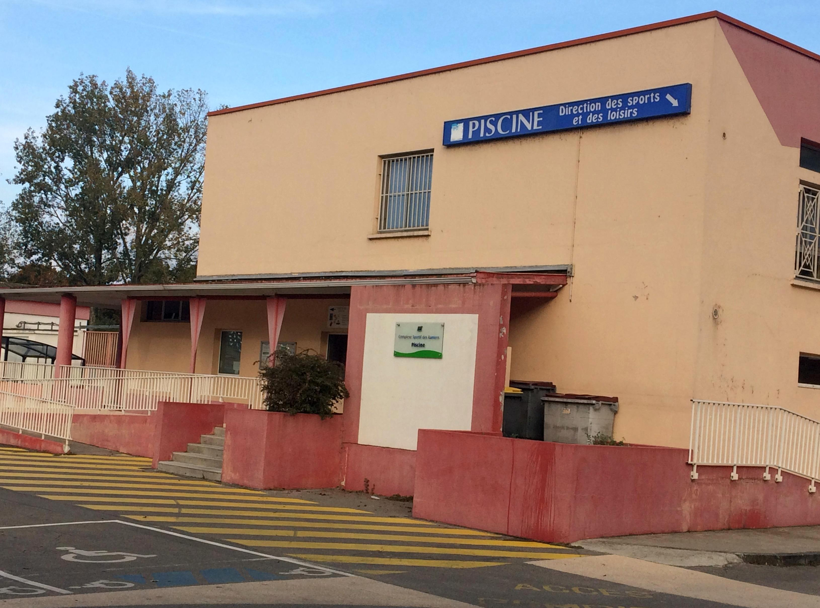 Piscine municipale des Ramier.